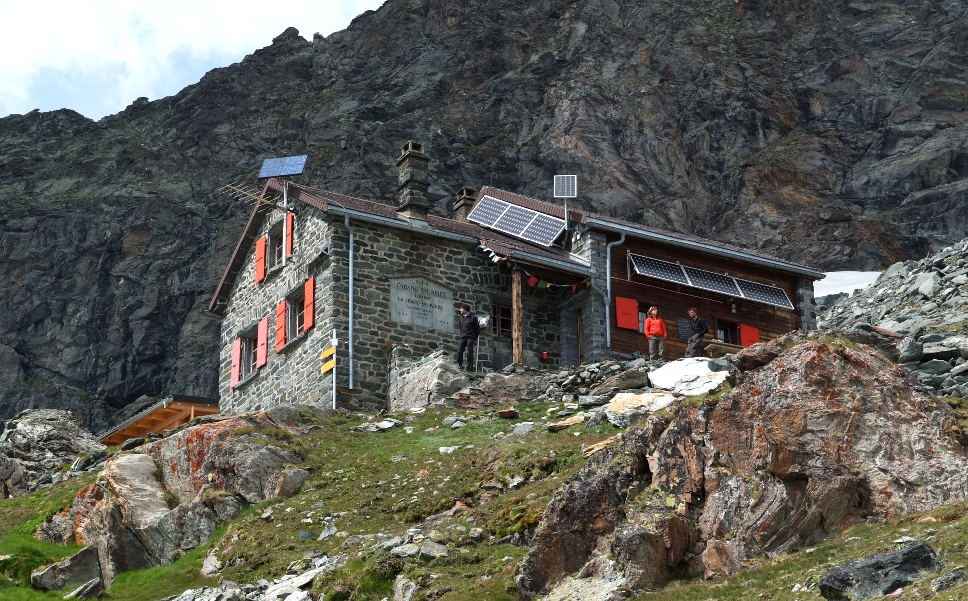 Cabane de Valsorey, 3027m